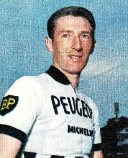 Roger Pingeon en 1968 - PANINI 1968/1969, n°176